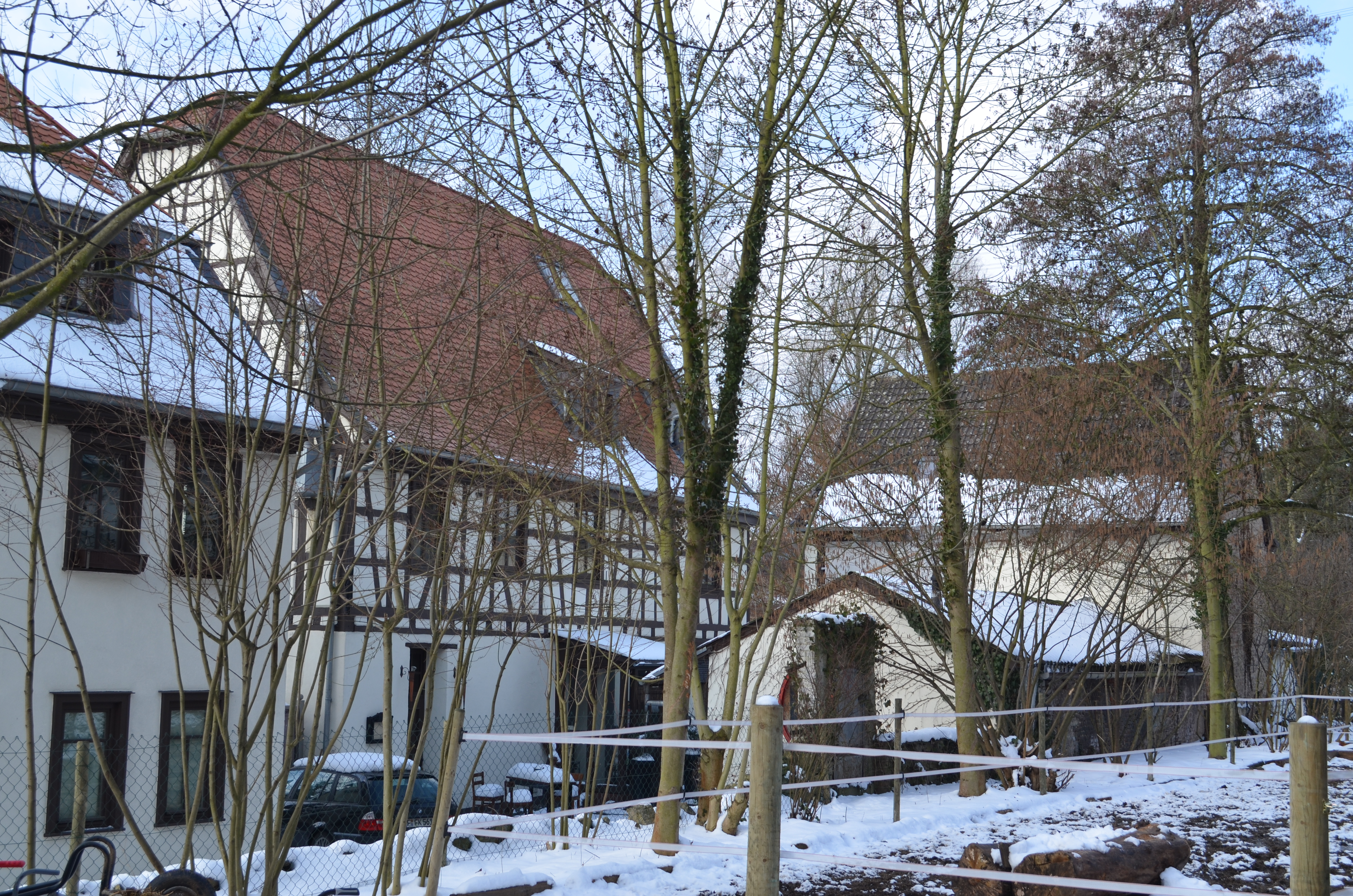 Niederursel, Oberurseler Weg 21